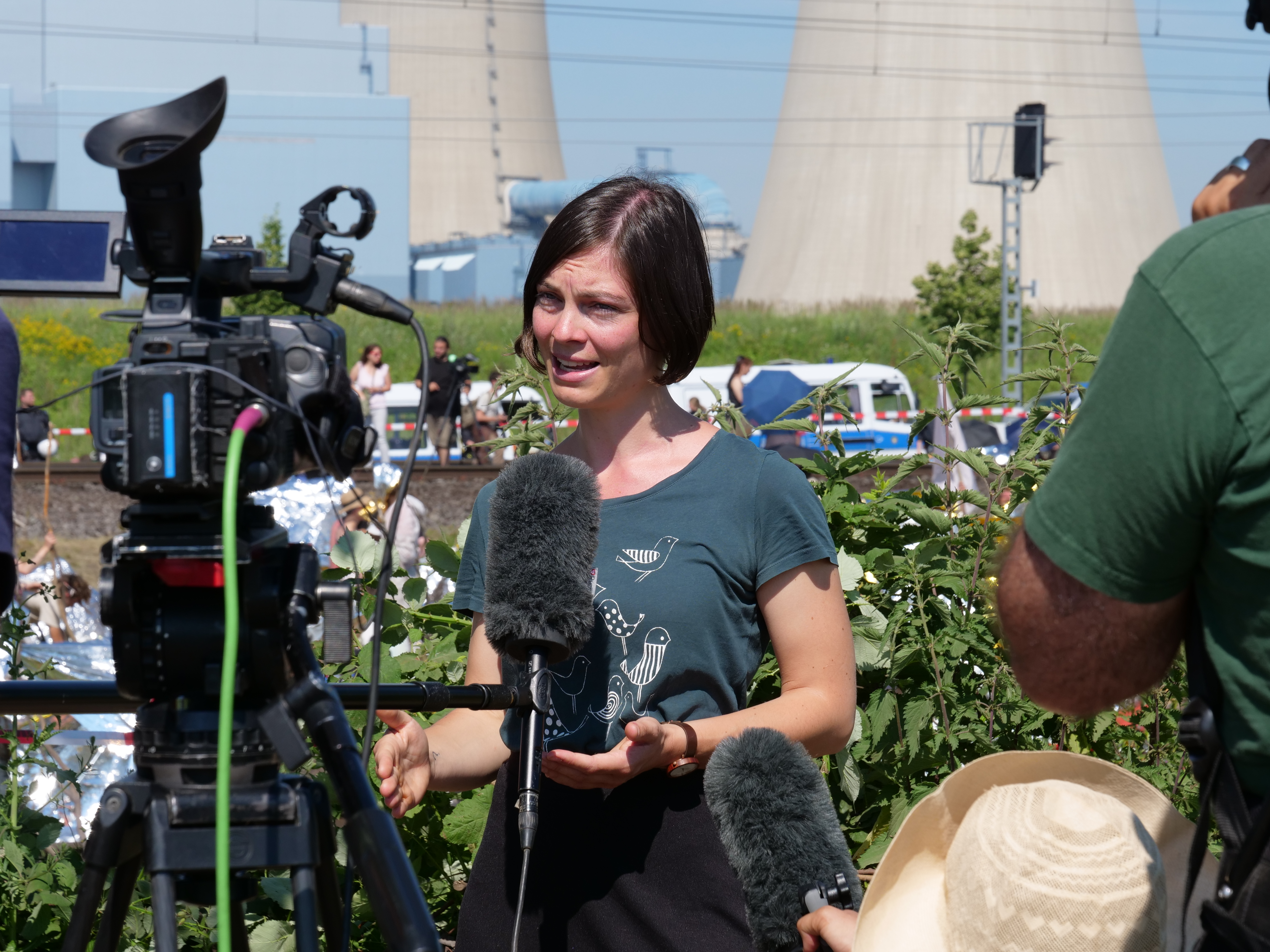 Blockade der Nord-Süd-Bahn durch Ende Gelände am Kraftwerk Neurath am 23. Juni 2019.